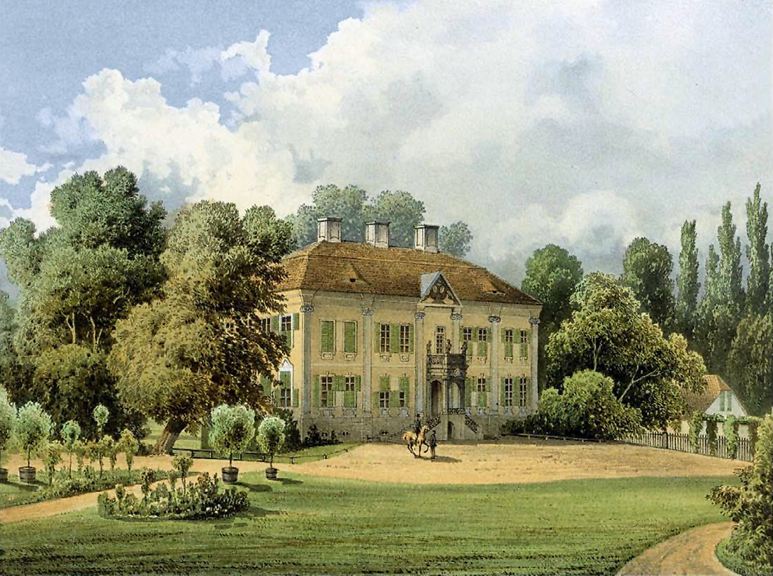 Schloss Stülpe in Stülpe, Brandenburg, Deutschland